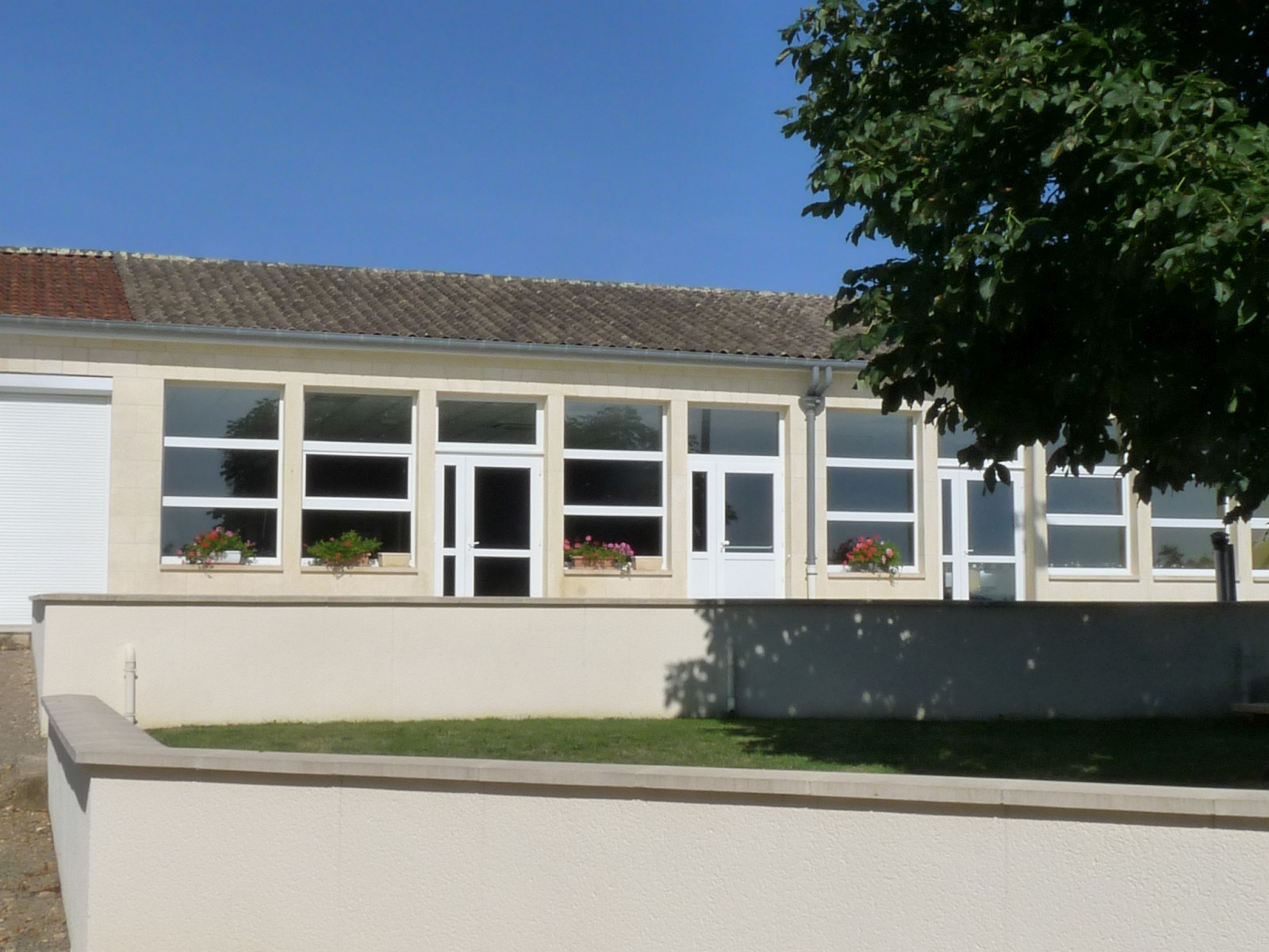 Salle des fêtes, mairie de St-Cibard, Gironde, France